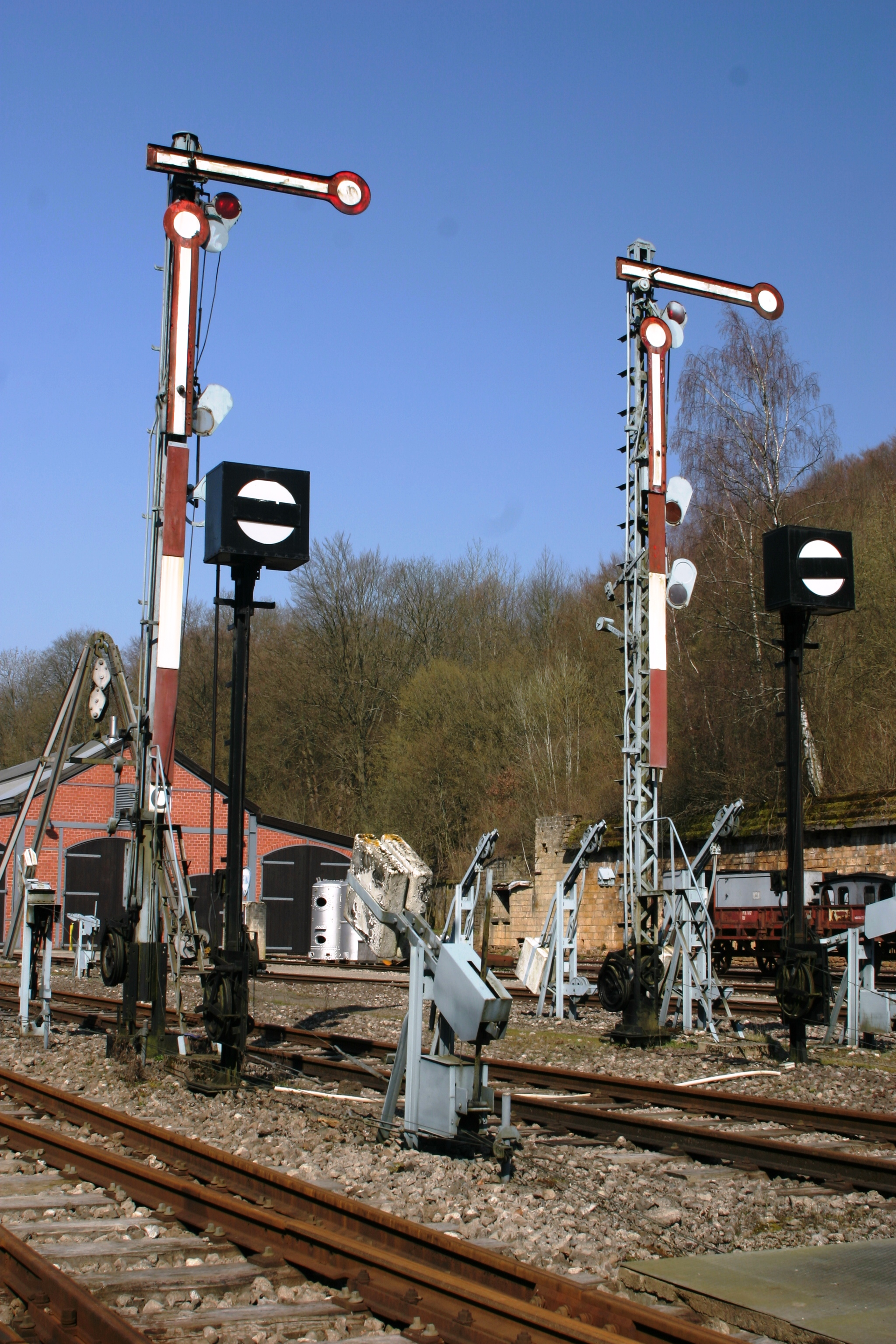 Semaphore. Kategorie:Industrie- an Eisebunnspark Fond-de-Gras